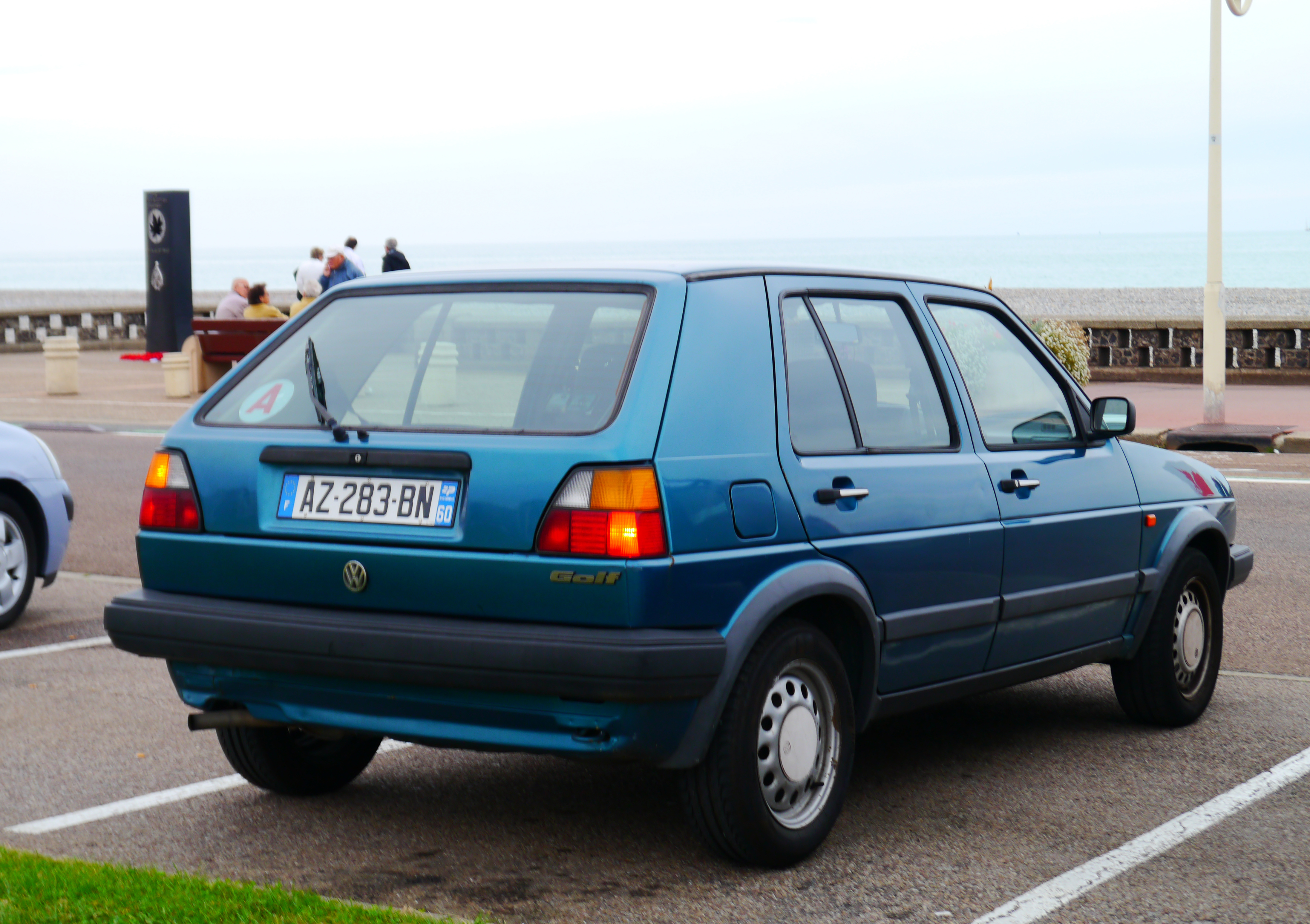 Volkswagen Golf MkII.